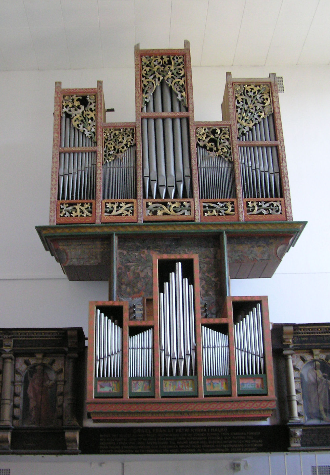 Old organ from Sankt Petri Church, Malmö, now in Malmöhus